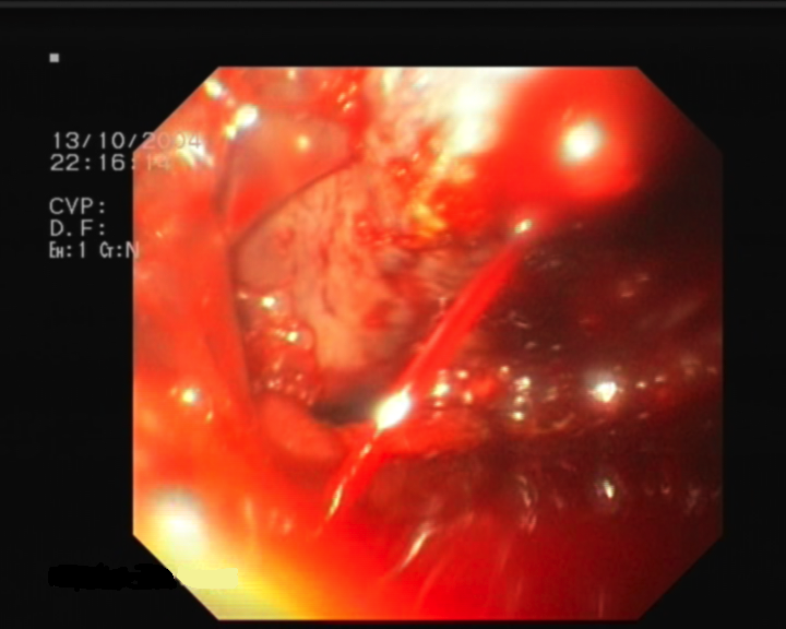 Krwawienie z żylaka przełyku (źródło krwawienia: prawy górny róg)